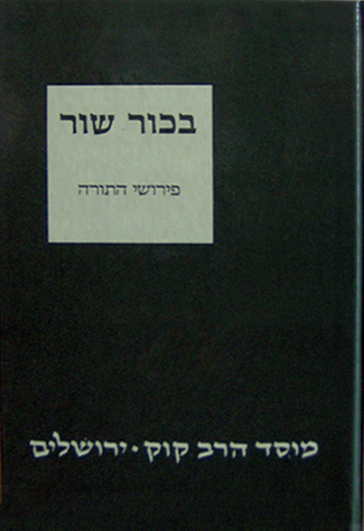 פירוש רבי he:יוסף בכור שור לתורה.